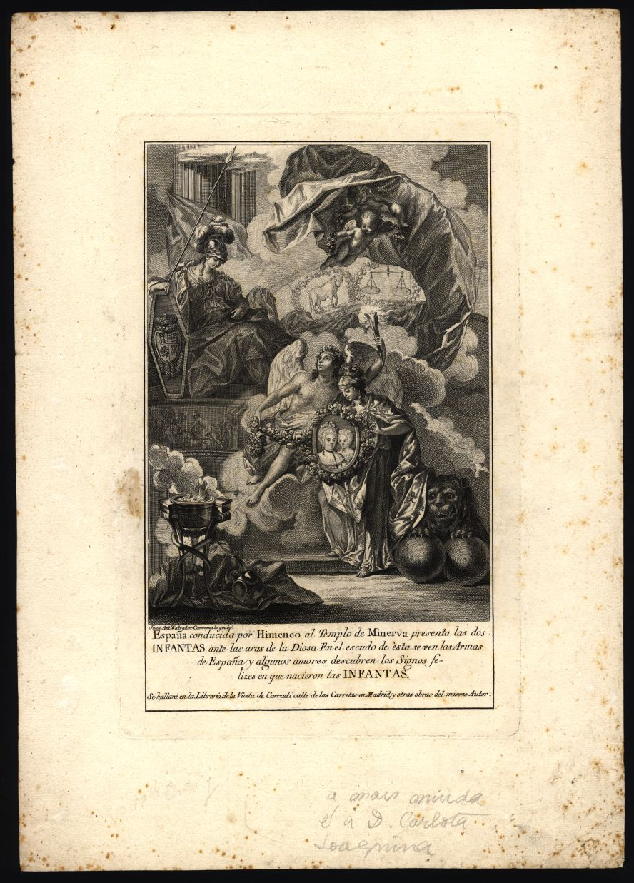 España conducida por Himeneo al templo de Minerva presenta las dos Infantas ante las aras de la Diosa. En el escudo de ésta se ven las Armas de España y algunos amores presentan los signos felices en que nacieron las infantas. Se hallará en la Librería de la viuda de Corradi calle de las Carretas de Madrid y otras obras del mismo autor. Juan Antonio Salvador Carmona lo grabó. Biblioteca Nacional de Portugal.